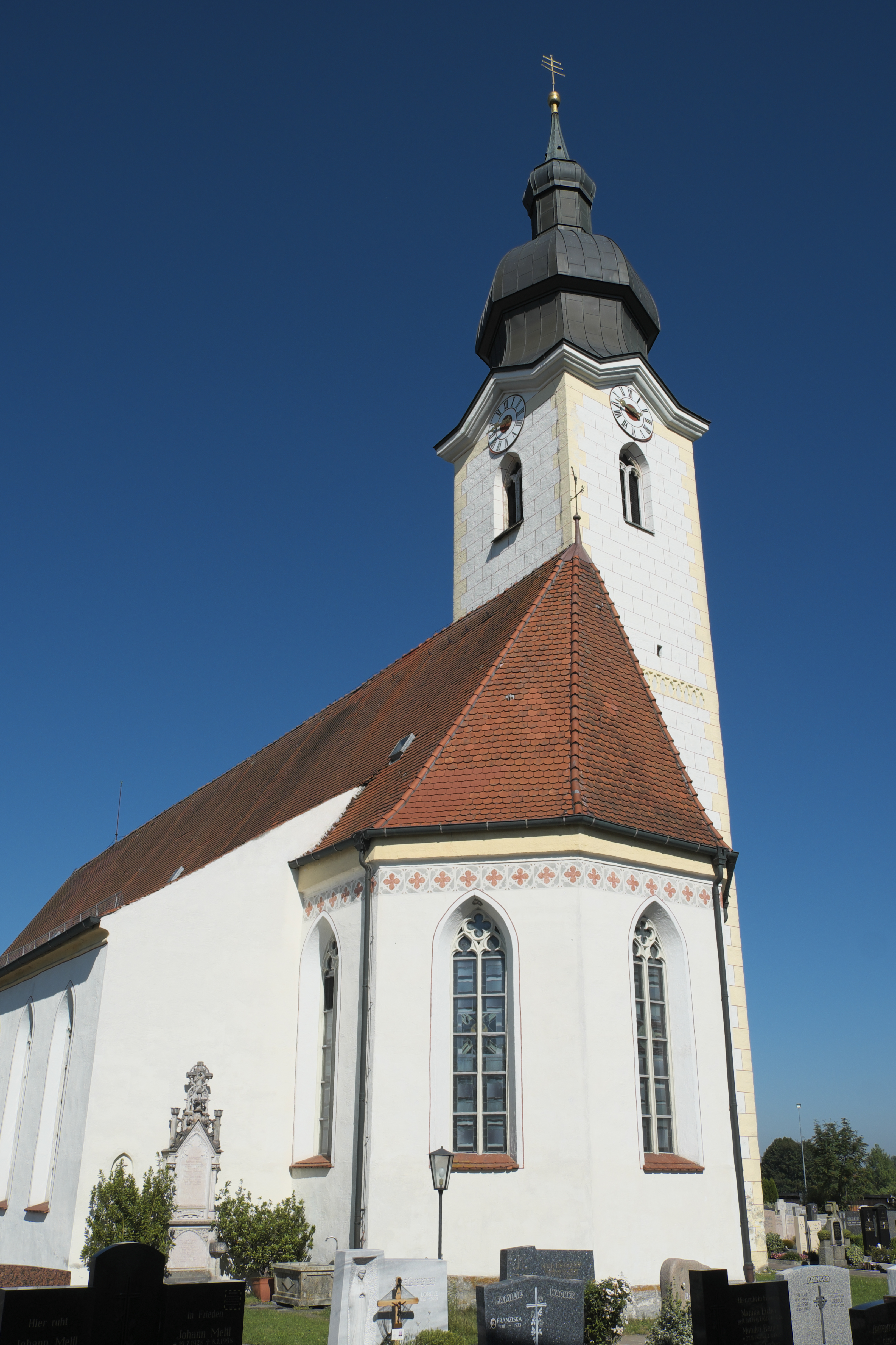 Katholische Pfarrkirche St. Rupertus in Eiselfing im Landkreis Rosenheim (Bayern/Deutschland), um 1500, Turmhaube von 1800